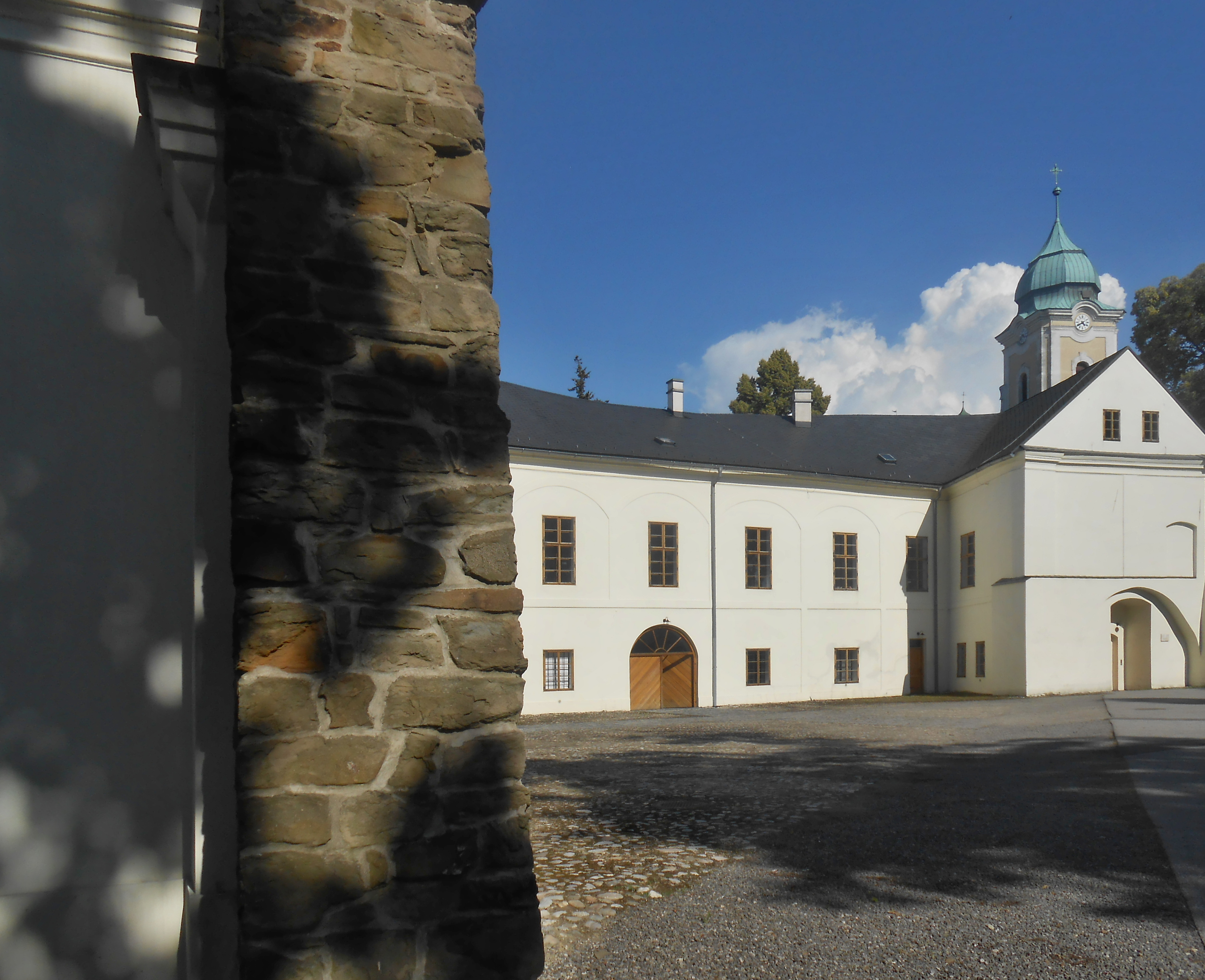 Hlučínský zámek, červenec 2013